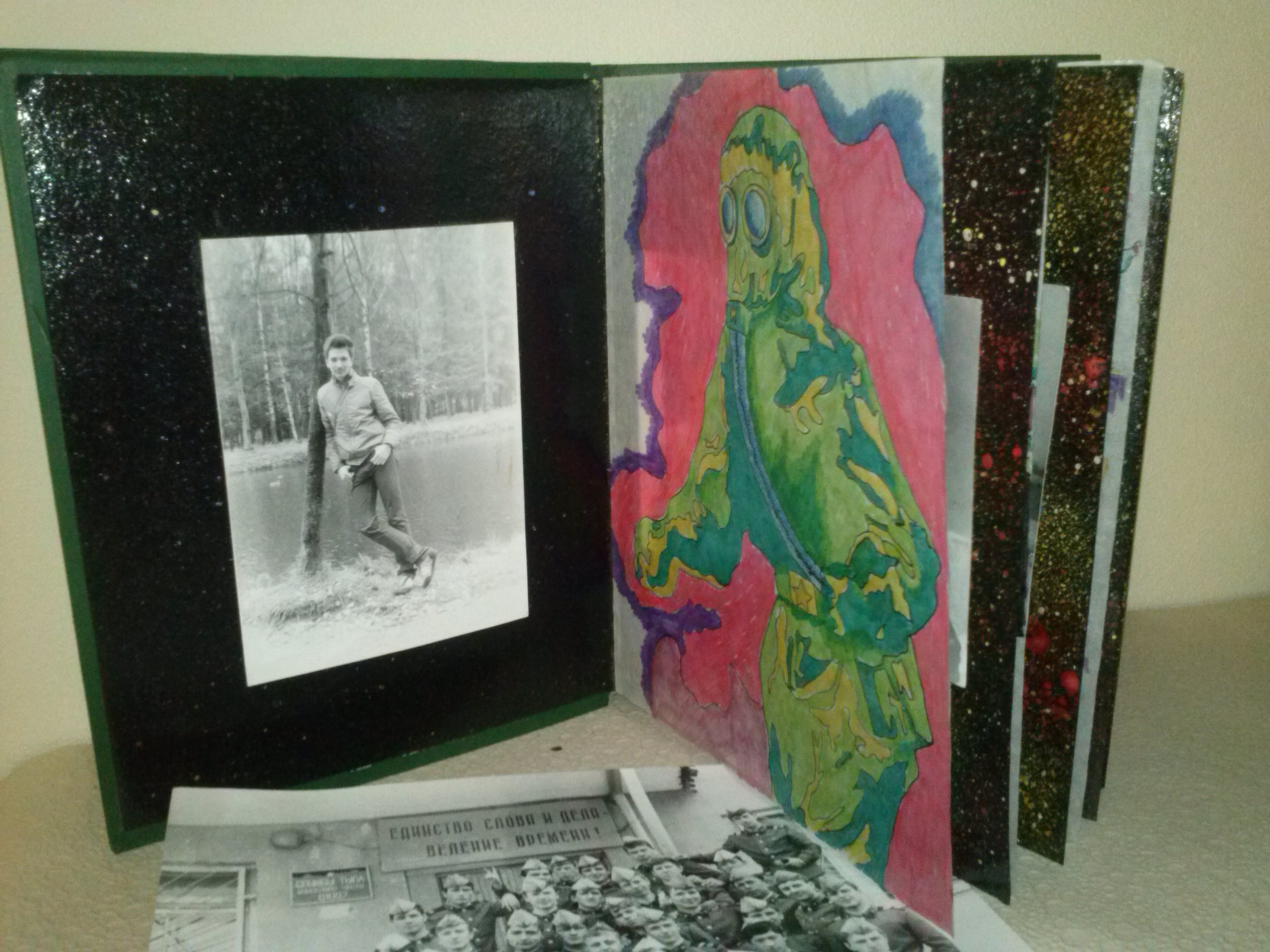 дембельский альбом. ЗабВО. ДМБ 87.